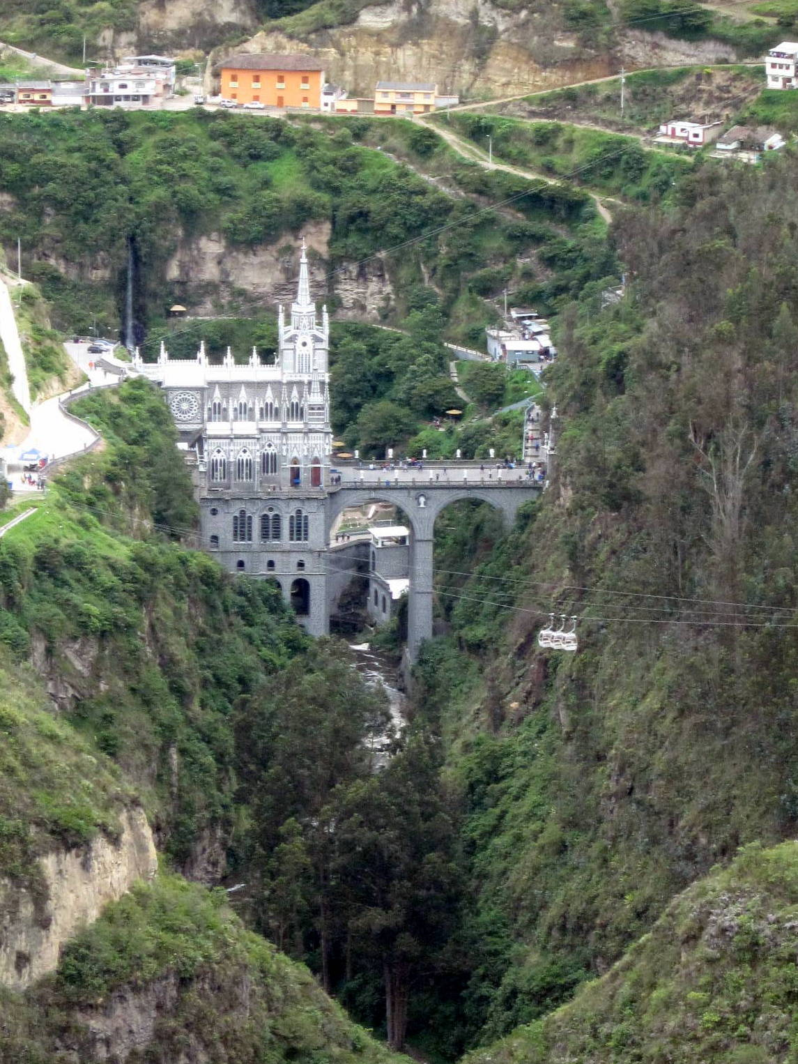 Santuario de las Lajas (Nariño-Colombia), es el templo más hermoso del mundo, se sitúa en Ipiales, a 11 kilómetros de la frontera colombo-ecuatoriana